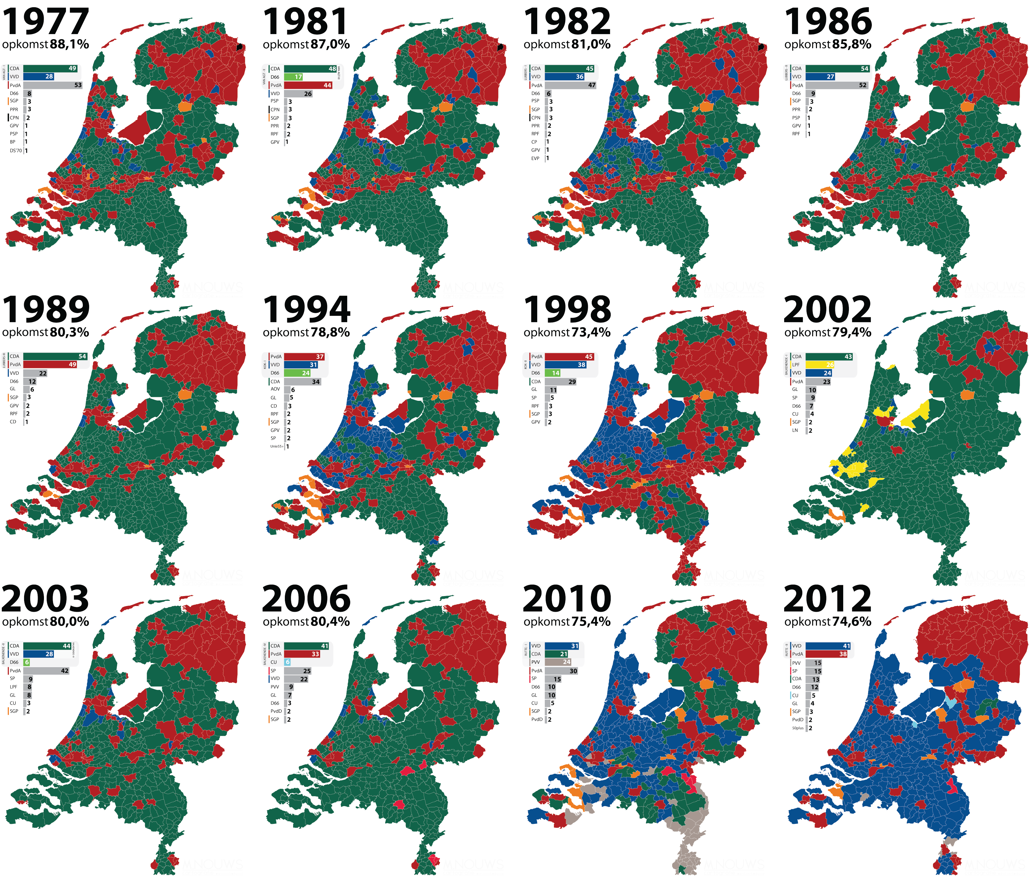 Grootste politieke partij per gemeente, zetelverdeling en kabinetscoalitie bij Tweede Kamerverkiezingen van 1977 tot 2012